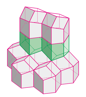 ウルツ鉱型